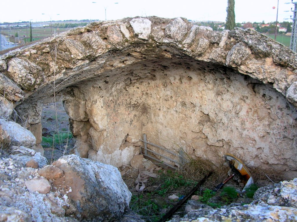 קבר סית מנע - מבפנים